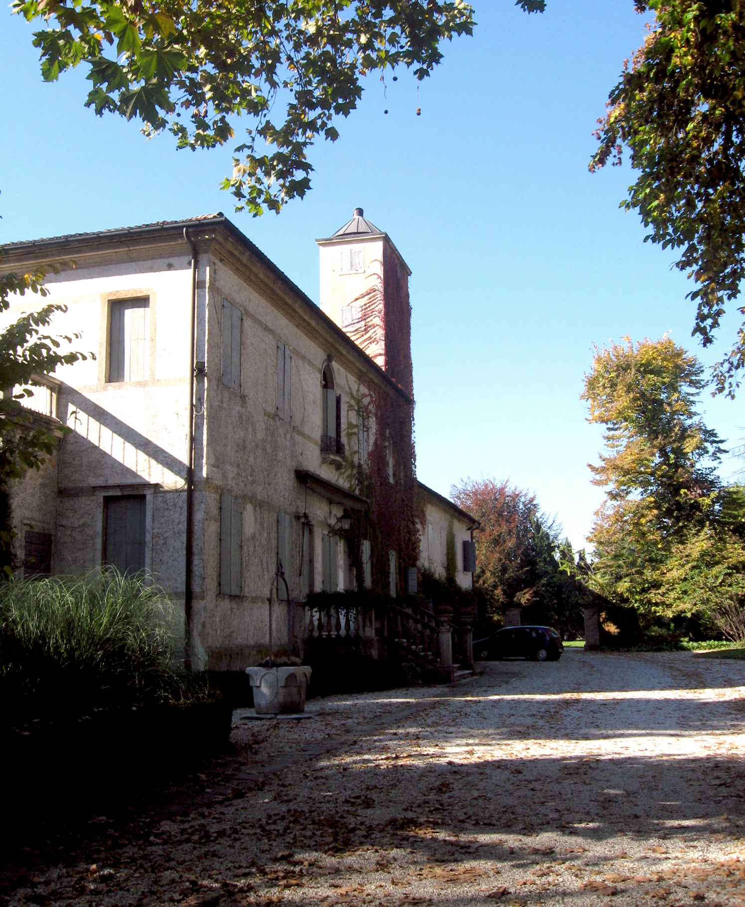 Villa Loredan Gallini Saccomani a Noventa Padovana